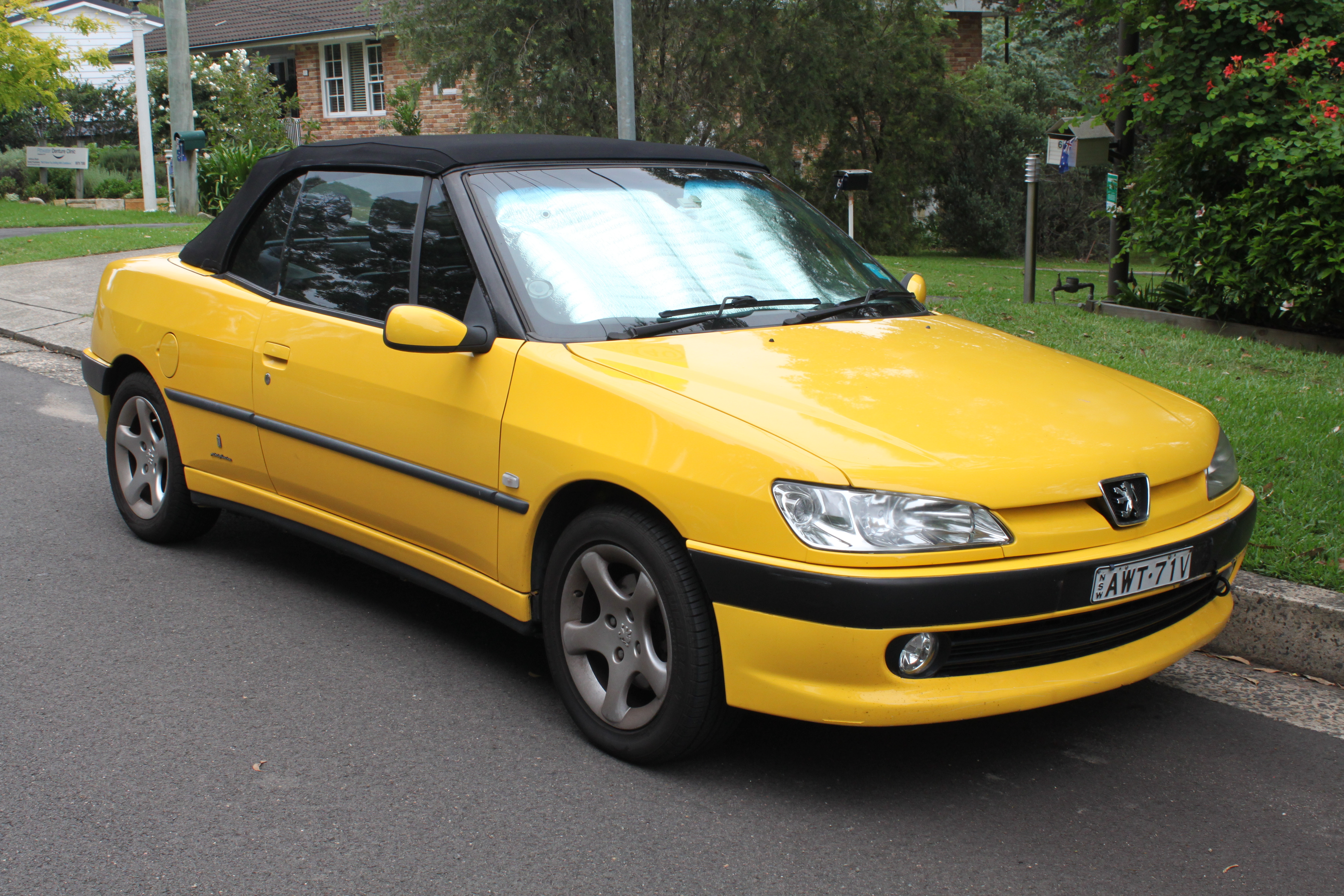 Peugeot 306 Convertible